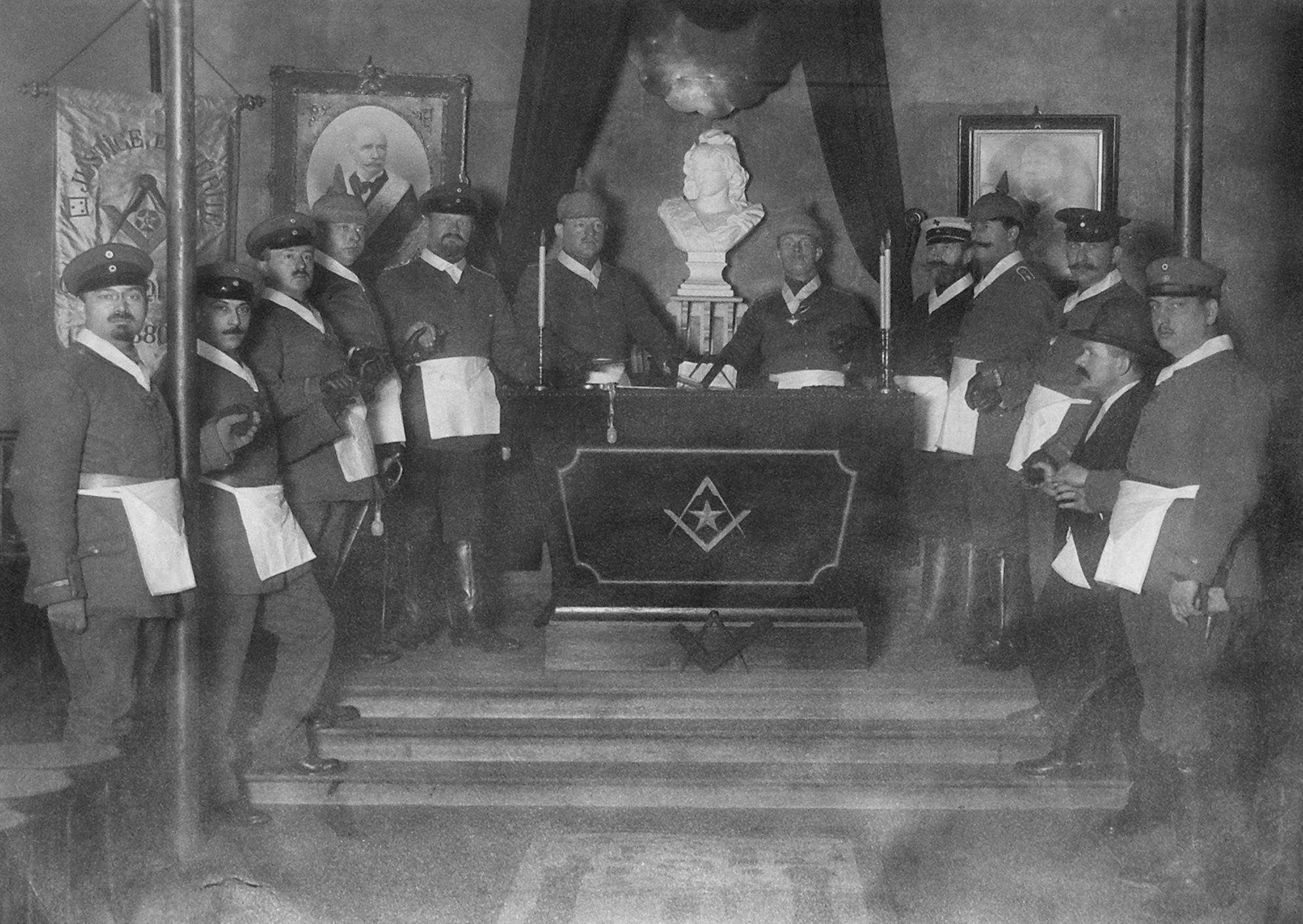 Bayreuth, Deutsches Freimaurermuseum — Loge "Zum aufgehenden Licht an der Sonne" (St. Quentin), Gruppenphoto